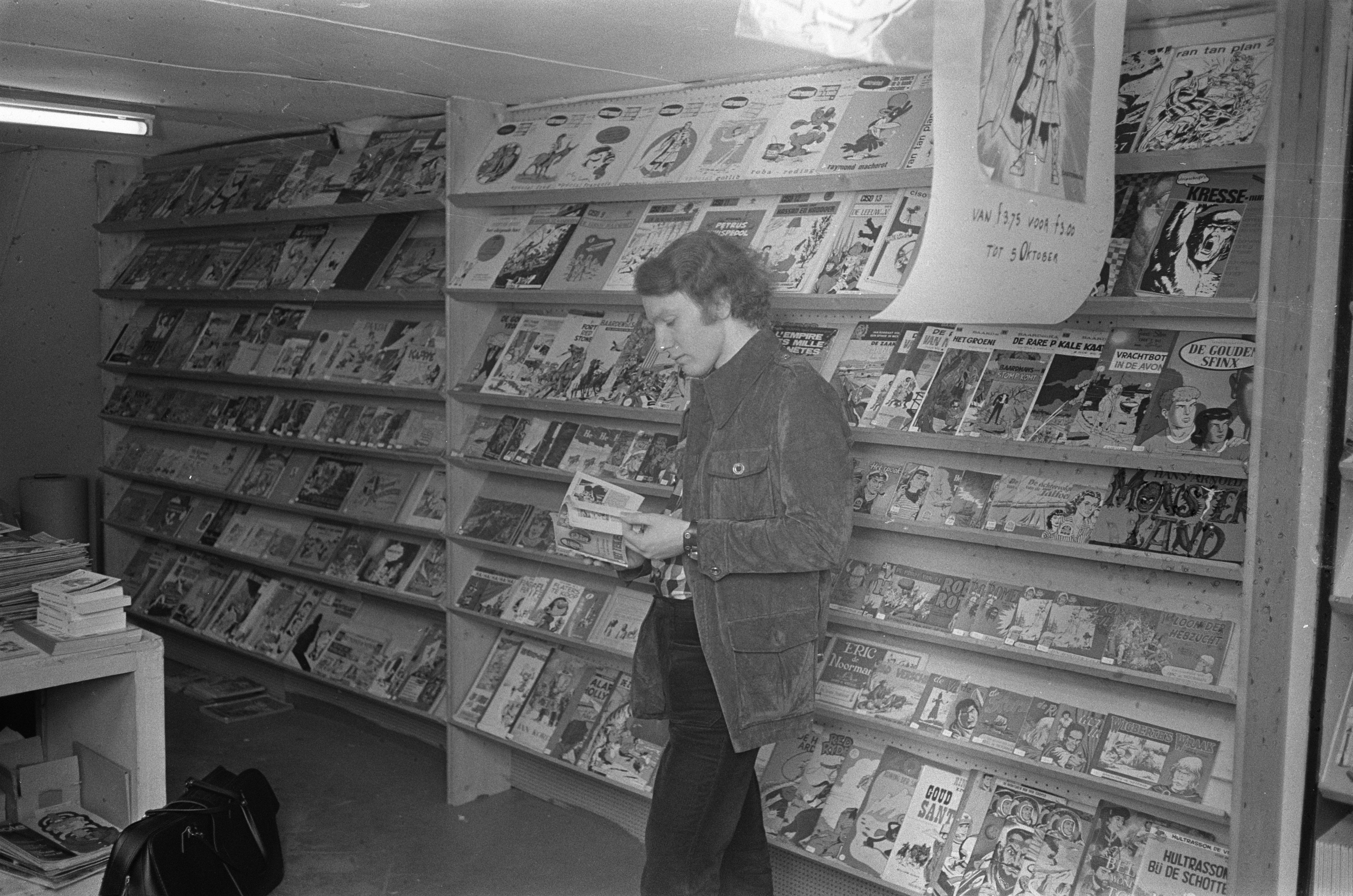 Collectie / Archief : Fotocollectie Anefo Reportage / Serie : [ onbekend ] Beschrijving : Opdracht Volkskrant, stripwinkel Lambiek Datum : 28 september 1973 Instellingsnaam : Volkskrant Fotograaf : Croes, Rob C. / Anefo Auteursrechthebbende : Nationaal Archief Materiaalsoort : Negatief (zwart/wit) Nummer archiefinventaris : bekijk toegang 2.24.01.05 Bestanddeelnummer : 926-7109